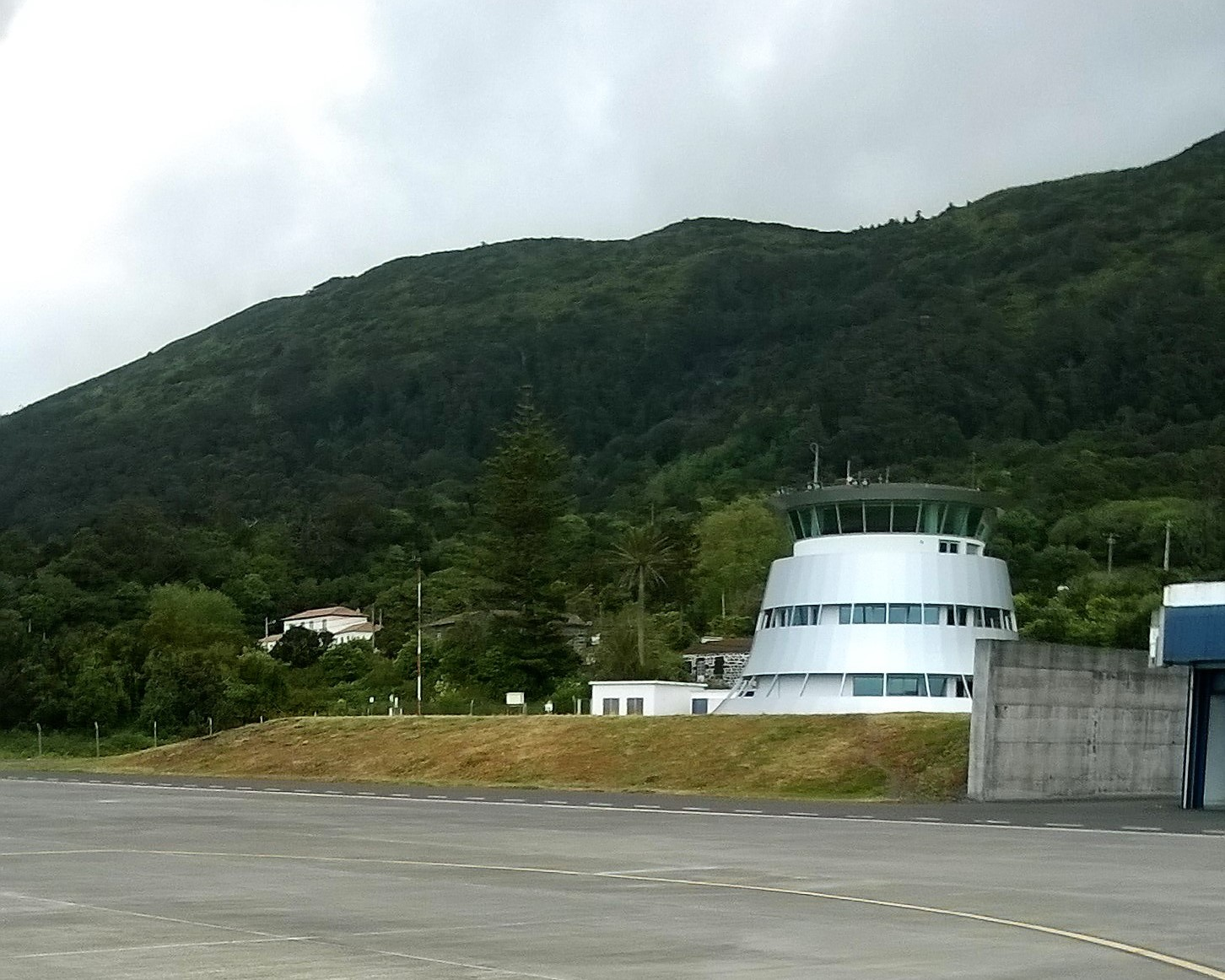 Aeródromo da ilha de São Jorge, Região Autónoma dos Açores, Portugal: torre de controlo.